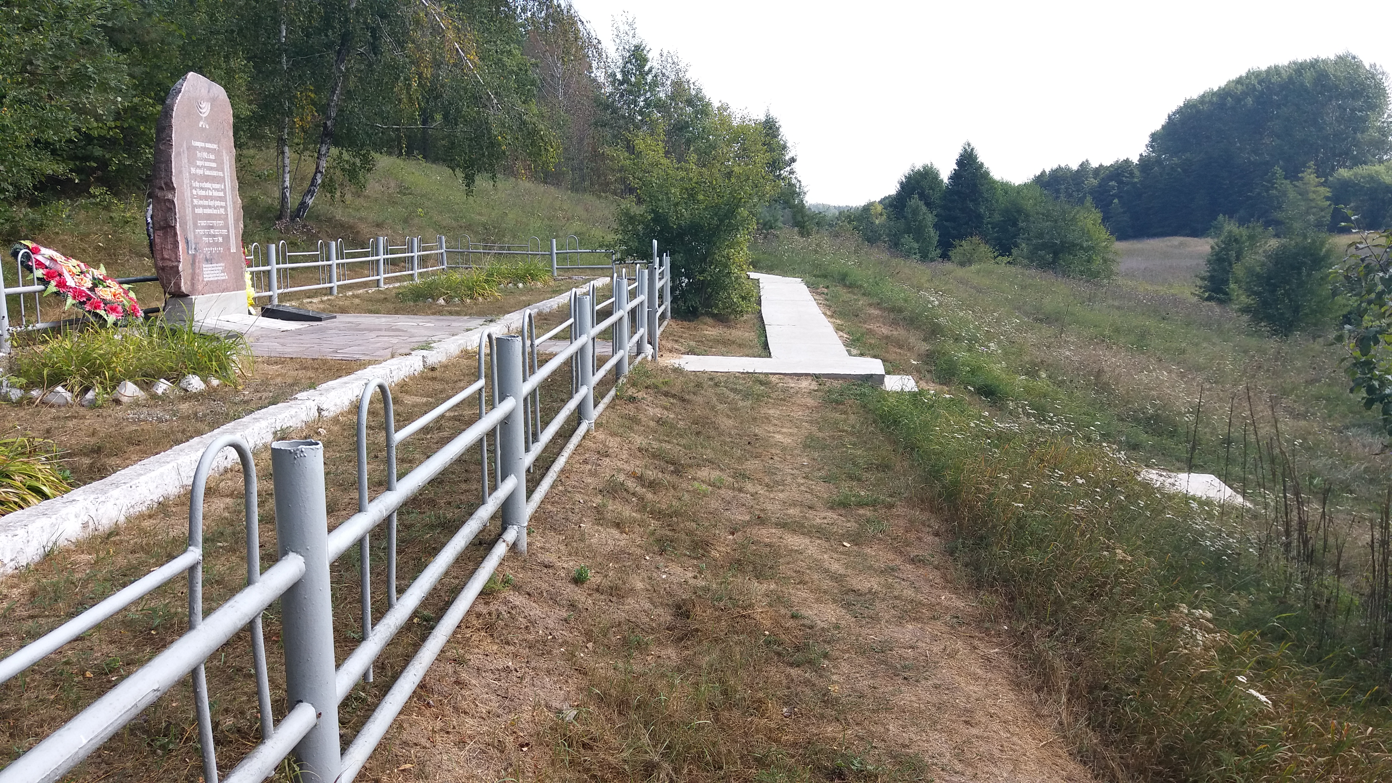 Памятник на месте перезахоронения 2965 евреев - узников гетто посёлка Копыль Минской области, убитых в Копыле в 1942 году.